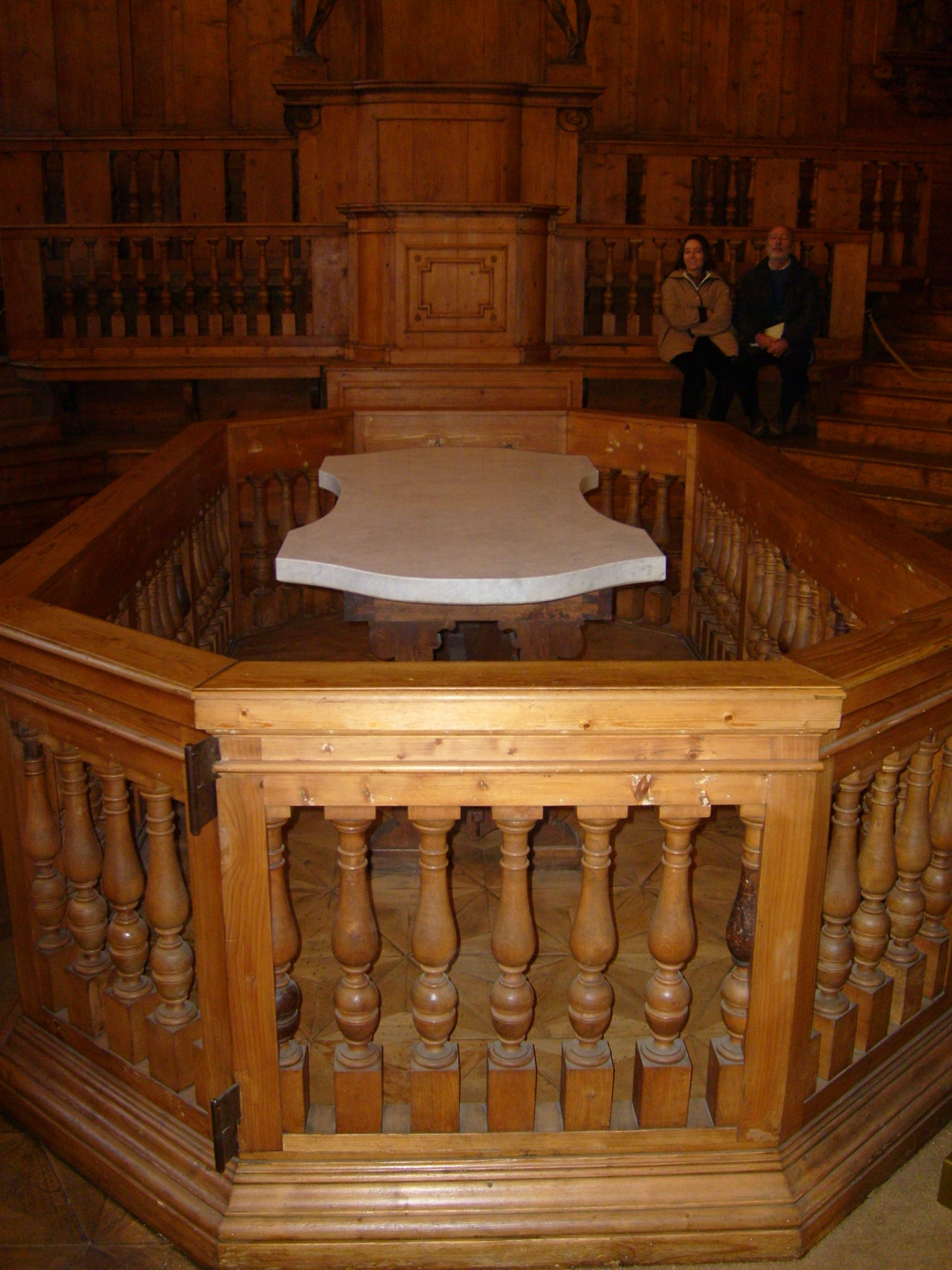 Anatomical theatre (the dissection table), Palazzo dell’Archiginnasio, Bologna, Italy